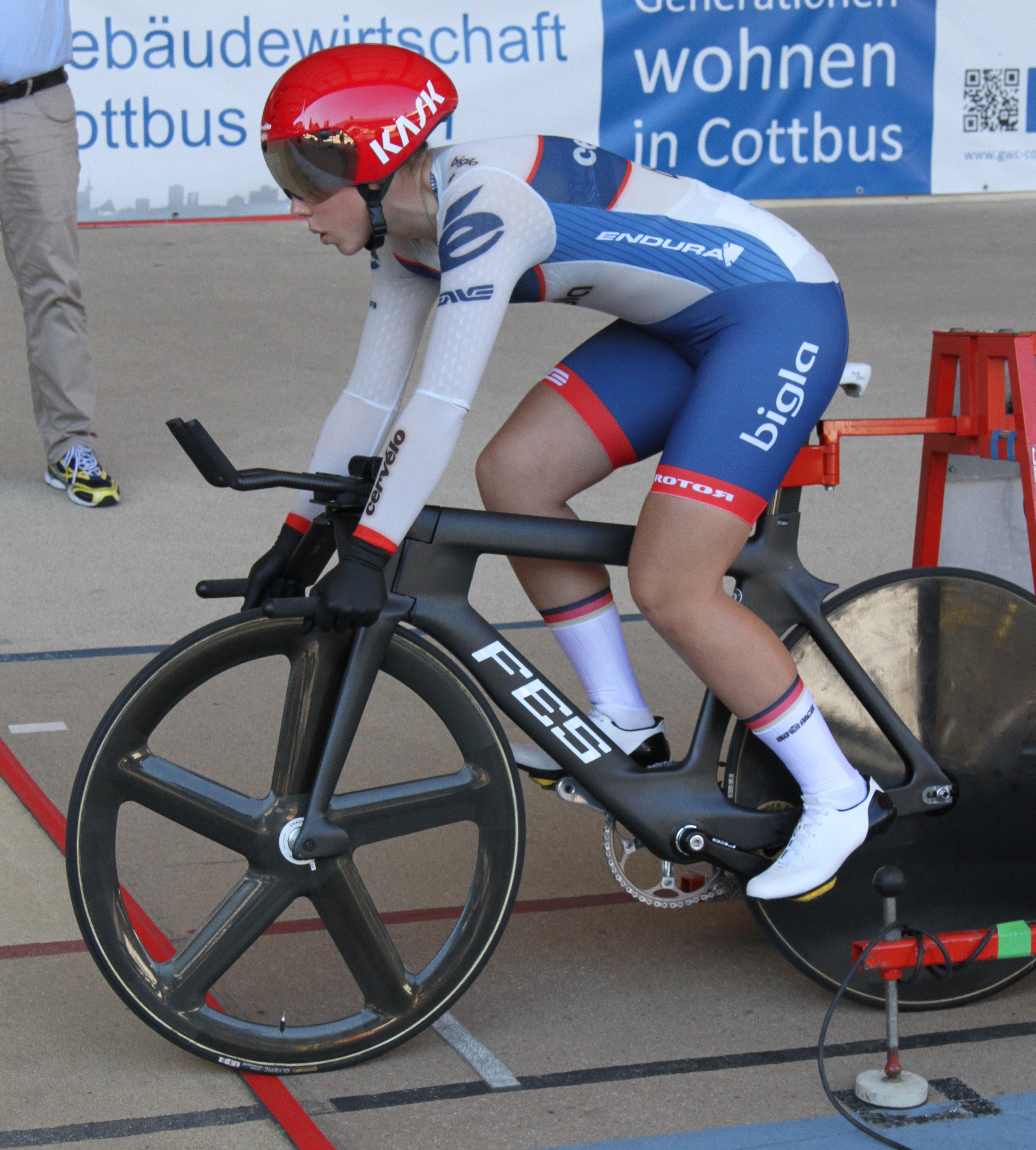 Lisa Klein, deutsche Radsportlerin